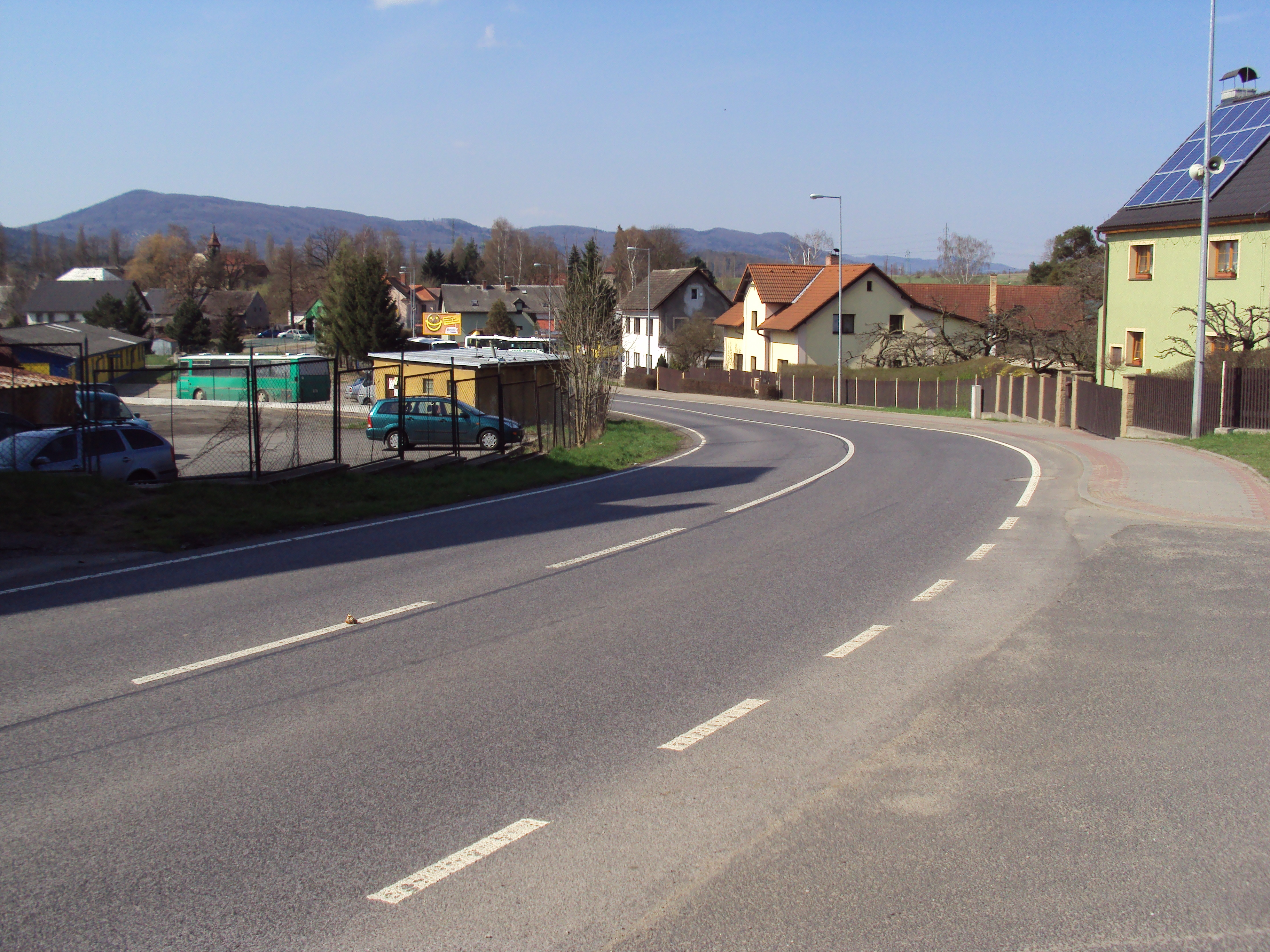 Silnice II/262 z České Lípy do Děčína, snímek přes Dolní Libchavu